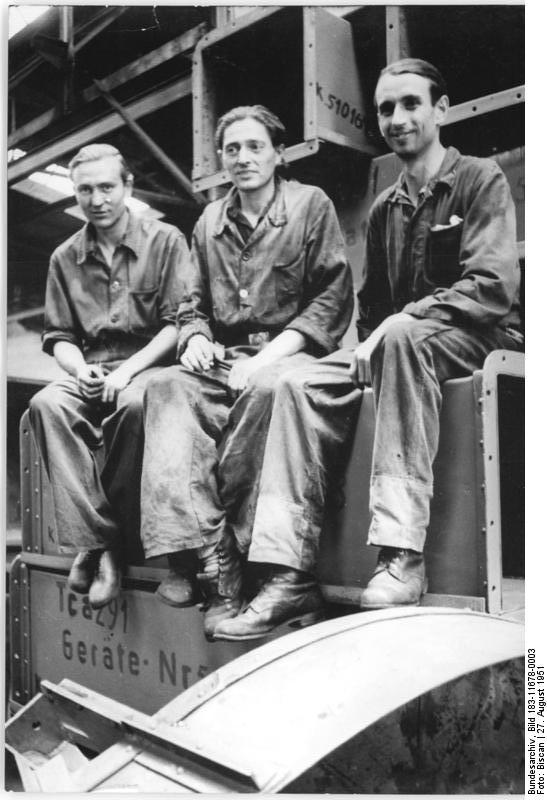 Industriearbeiter, Arbeitspause Illus Biscan Gr-Qu. 27.8.51 Mit verstärkter Kraft an den Aufbau. UBz: Die Weltfestspiele haben auch die Blechschmiede Helmuth Steinecke (links) und Walter Freund (rechts) von den Abus-Werken in Magdeburg mit Begeisterung erfüllt. Sie gingen nach ihrer Rückkehr aus Berlin mit verstärktem Elan ans Werk, begeisterten auch ihren Kollegen Heinz Heyder (Mitte) und beschlossen, fortan nicht "nur" 130% ihres Monatssolls zu leisten, sondern 140%, um die Aufträge auf Schneckentröge möglichst schnell zu efüllen.